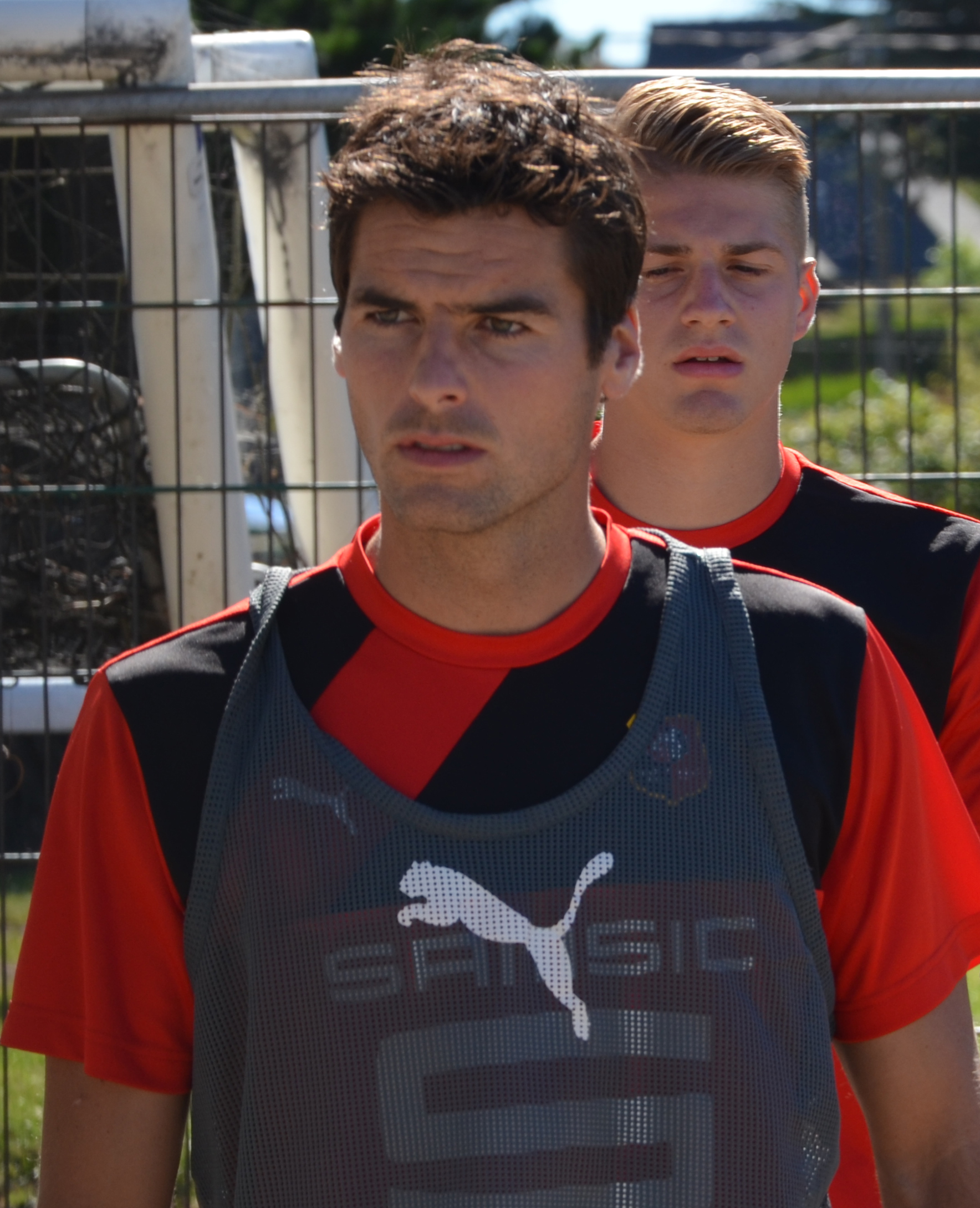 Photographie prise lors du match opposant le Stade rennais à l'USM Alger en match amical au stade Paul-Audrin de Dinard le 16 juillet 2016. Ici, Yoann Gourcuff.